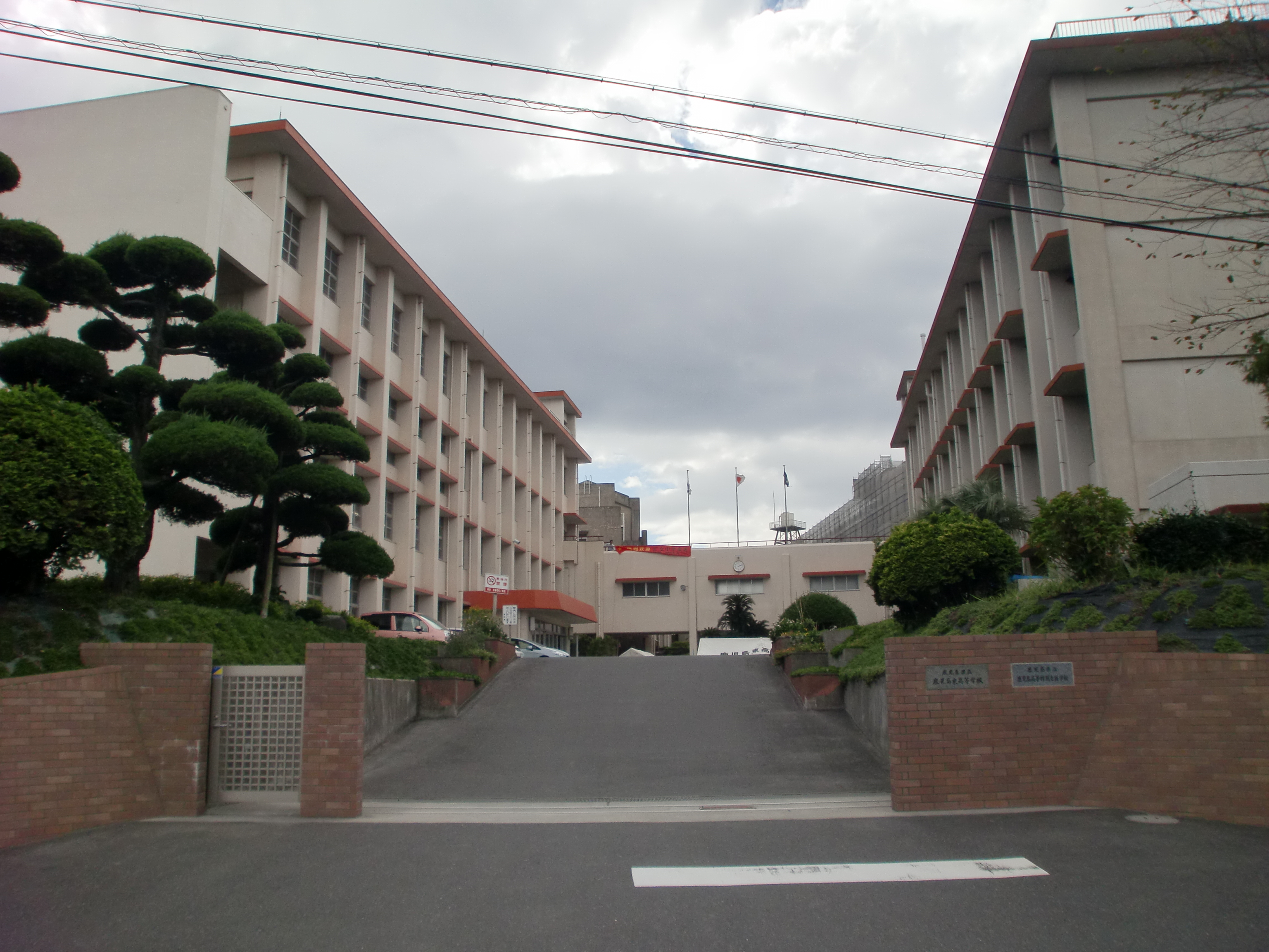 鹿児島県立鹿児島東高等学校及び鹿児島県立鹿児島高等特別支援学校（2012年度開校予定）の外観。